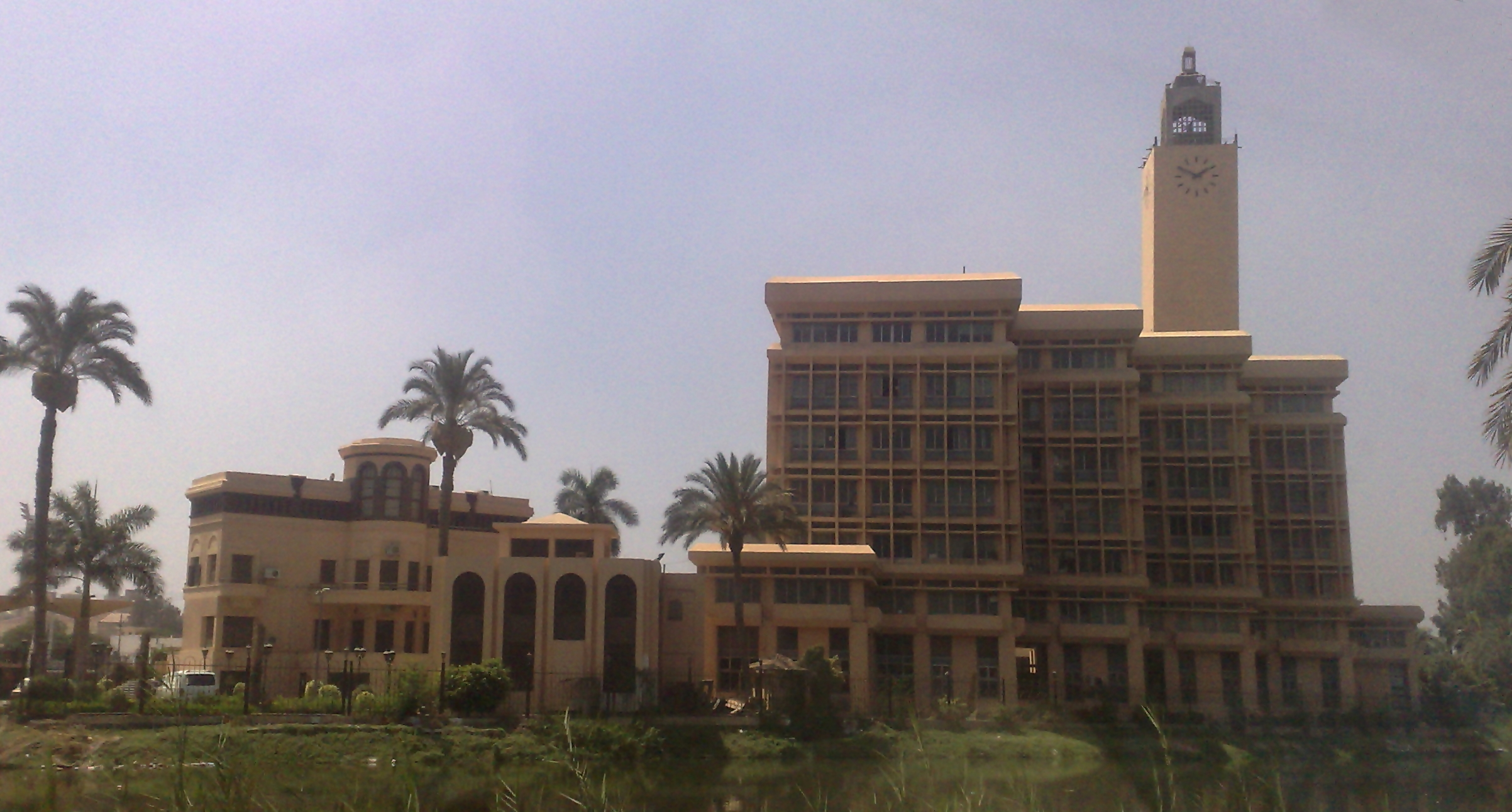 صورة خلفية للمباني الإدارية لجامعة المنوفية